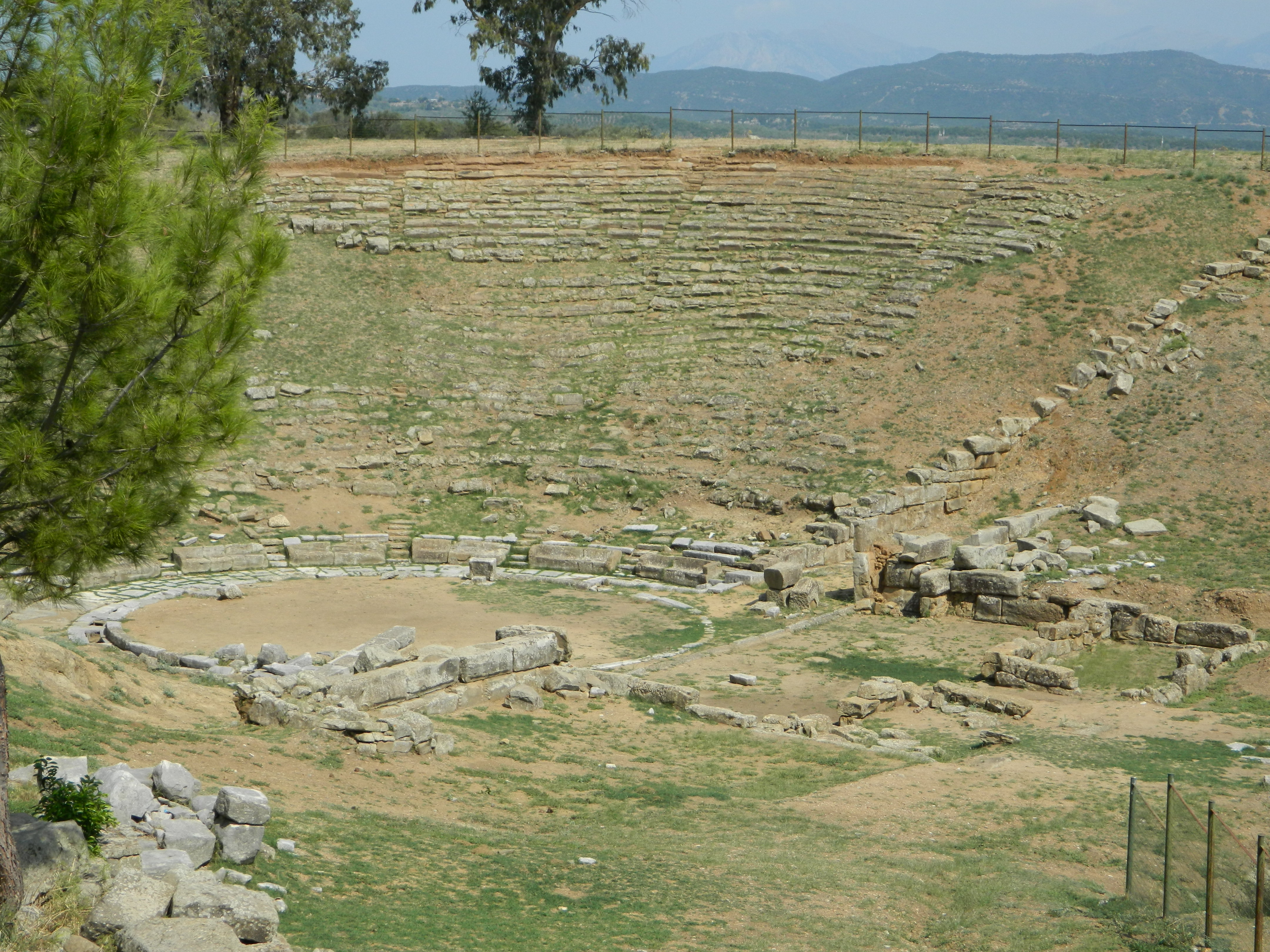 Στράτος«Στράτος»